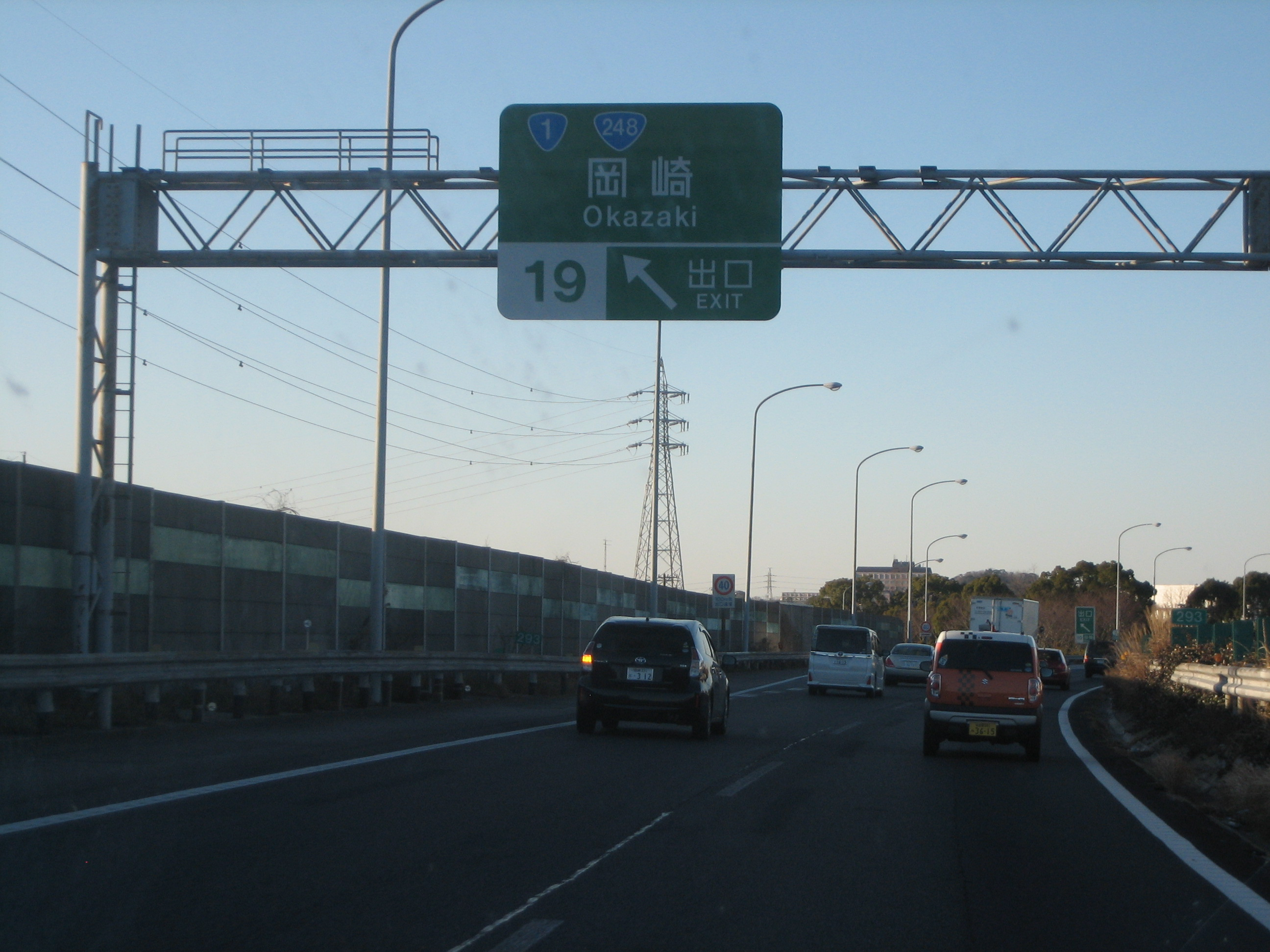 岡崎IC